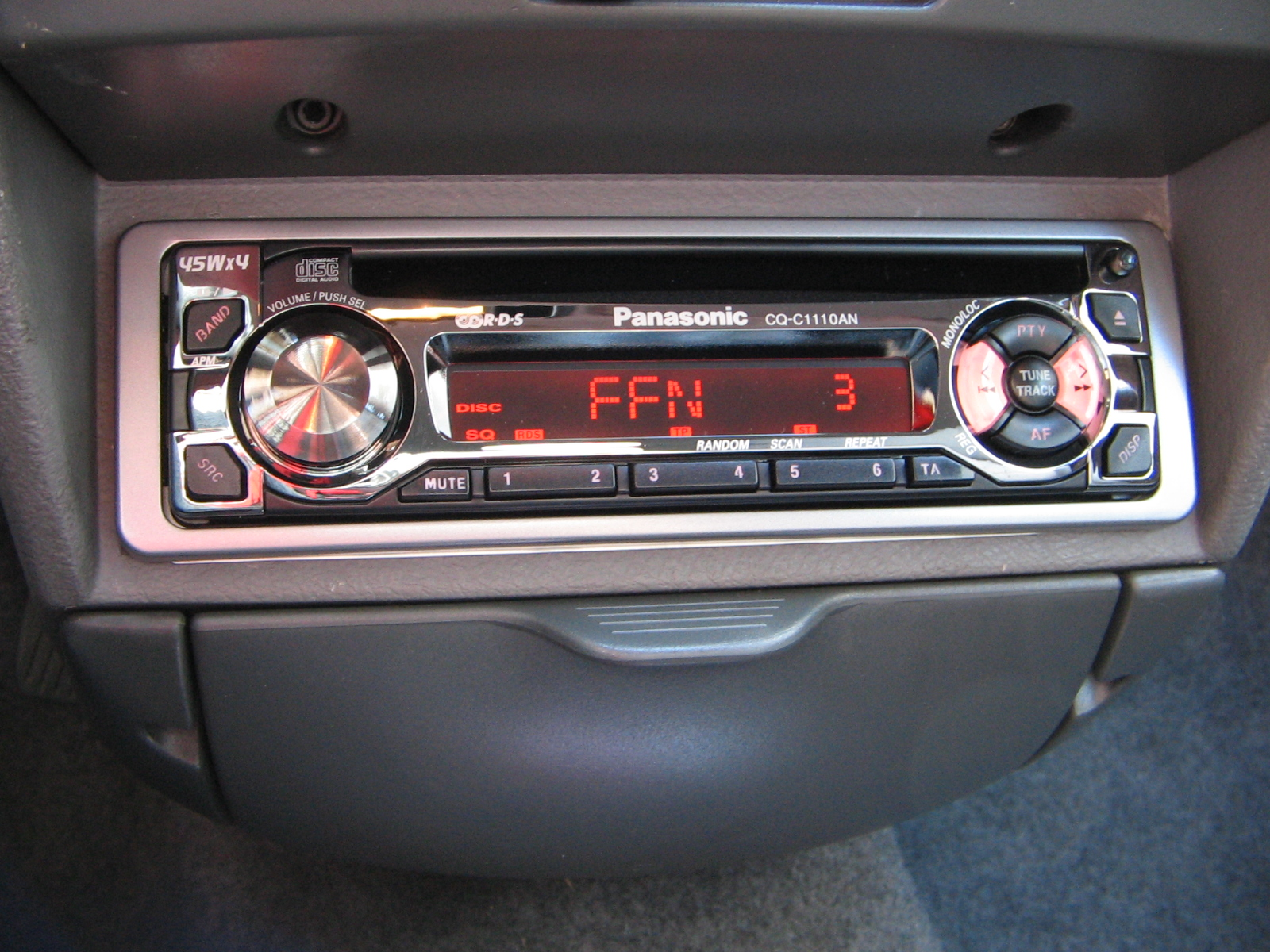 Bildbeschreibung: Panasonic Autoradio Quelle: selbst fotografiert Fotograf/Zeichner: Zoidy Datum: 2. Juni 2006